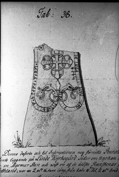 Runsten. Foto efter teckning ur Hilfelings resa på Gotland 1799. Kategori: (09) Runstenar, bildstenar Runsten. Foto efter teckning ur Hilfelings resa på Gotland 1799.